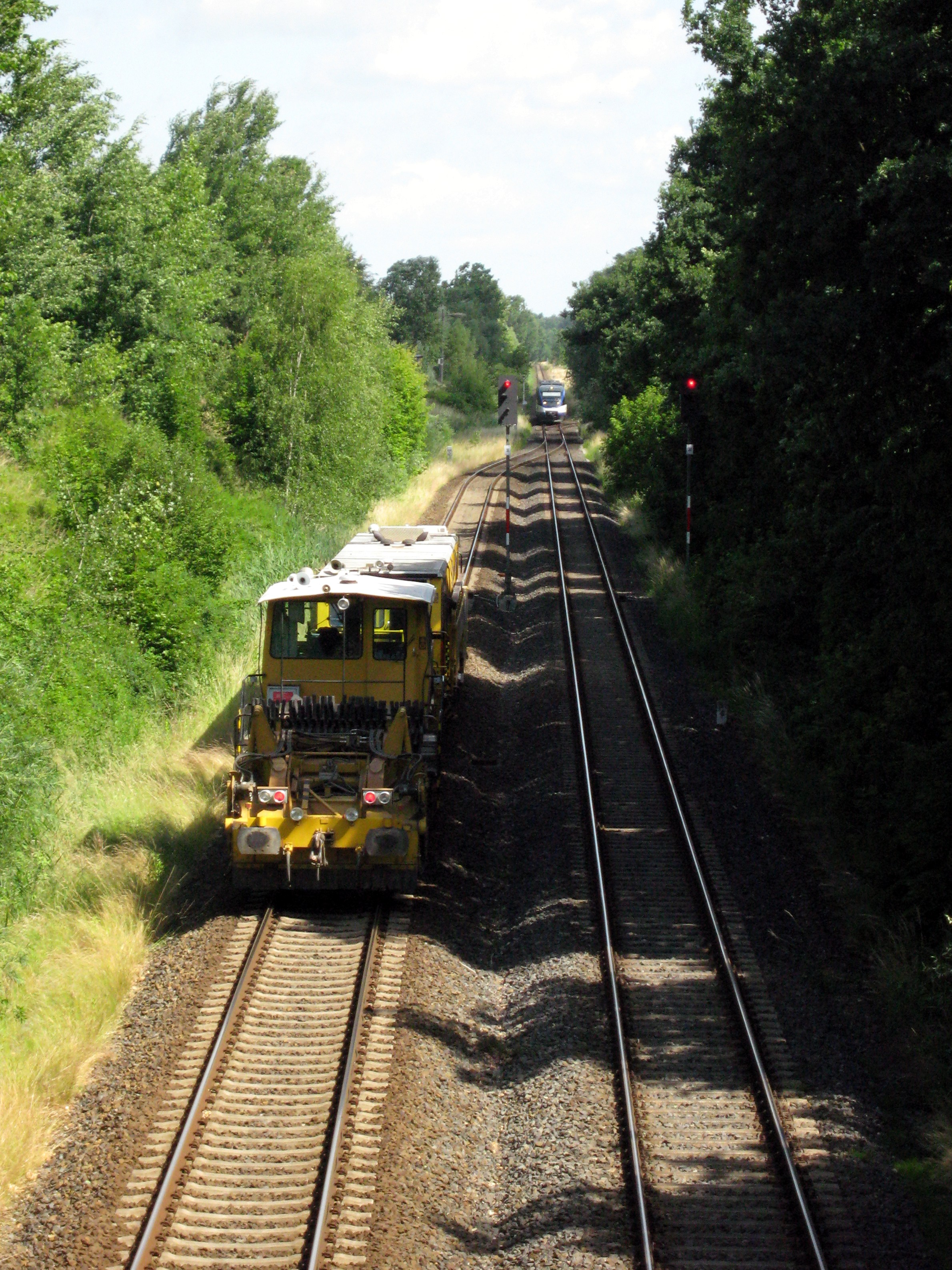 Streckenabschnitt der Niederbarnimer Eisenbahn in Schönerlinde (Richtung Schönwalde), Gemeinde Wandlitz, Landkreis Barnim, Land Brandenburg, Deutschland